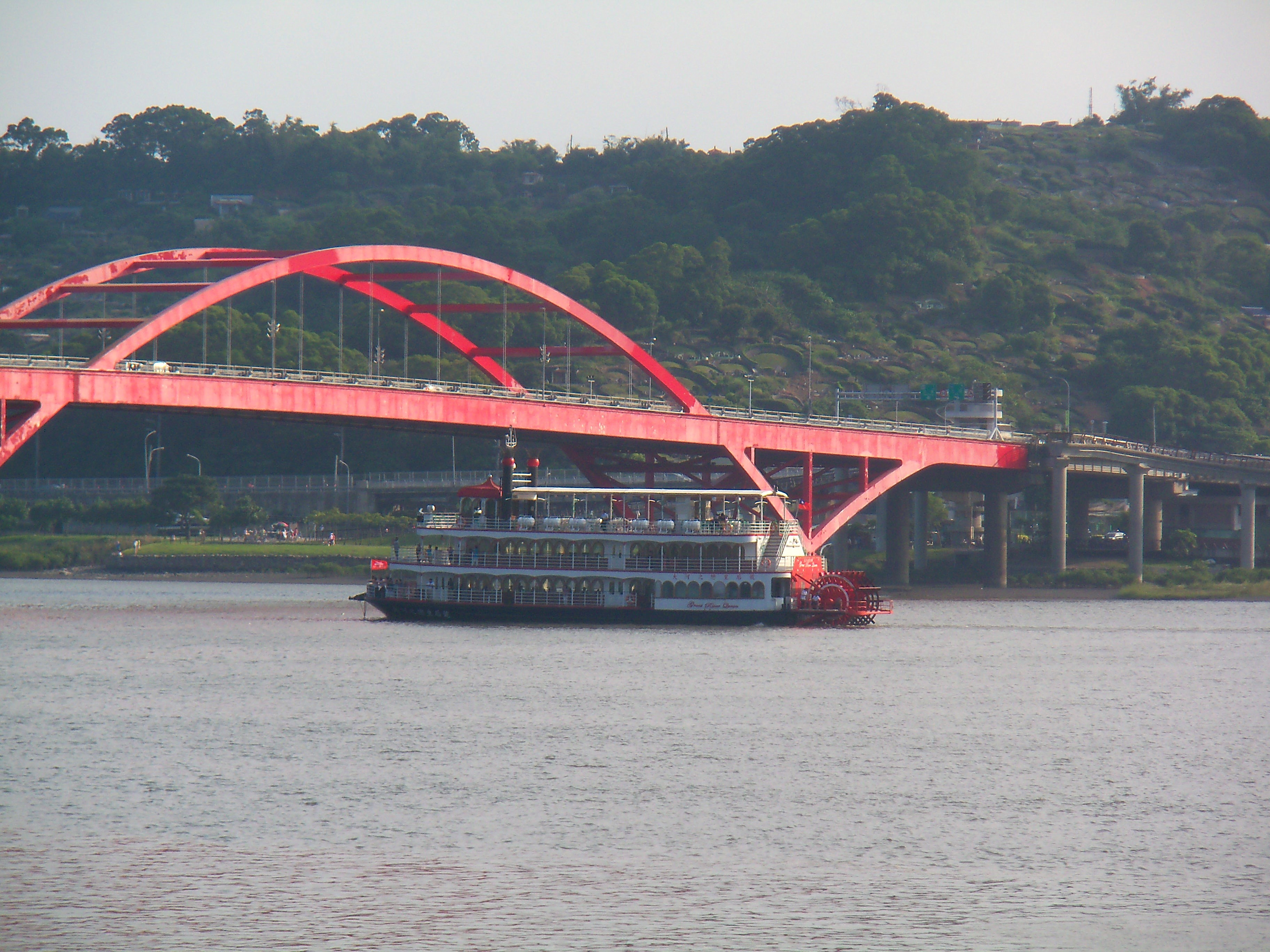 航經臺北關渡大橋下的大河之戀皇后號遊輪。